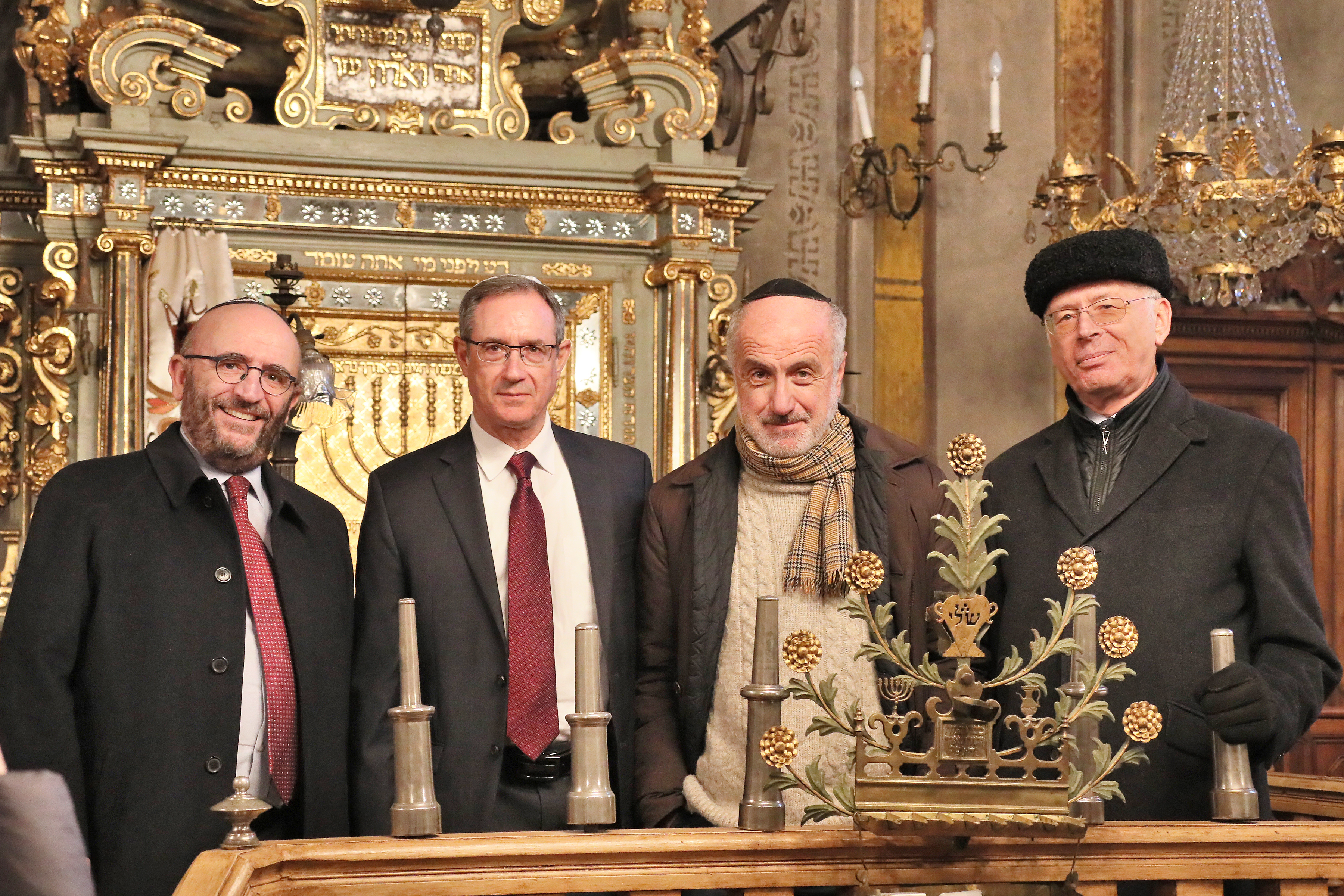 טקס לכבוד אנצו קאווליון בבית הכנסת בקונאו, איטליה